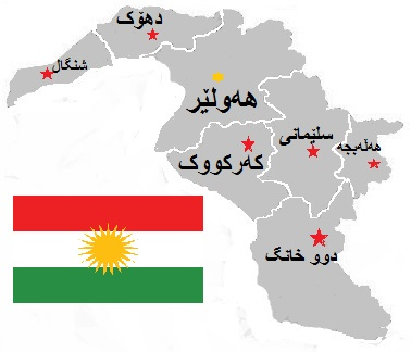 کوردی: باشوور